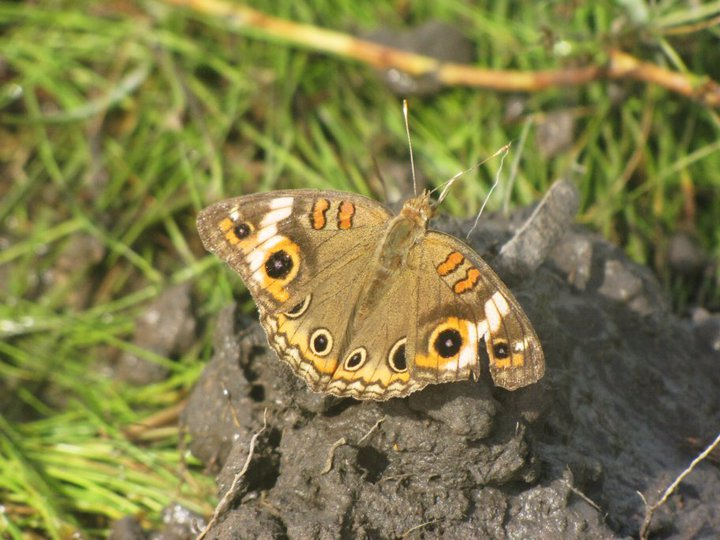 Juniona evarete (Cramer, [1779]) Parque nacional Aguaro-Guariquito, estado Guárico - Venezuela (2009)